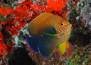 Centropyge potteri en el Santuario Marino del Noroeste de Hawái